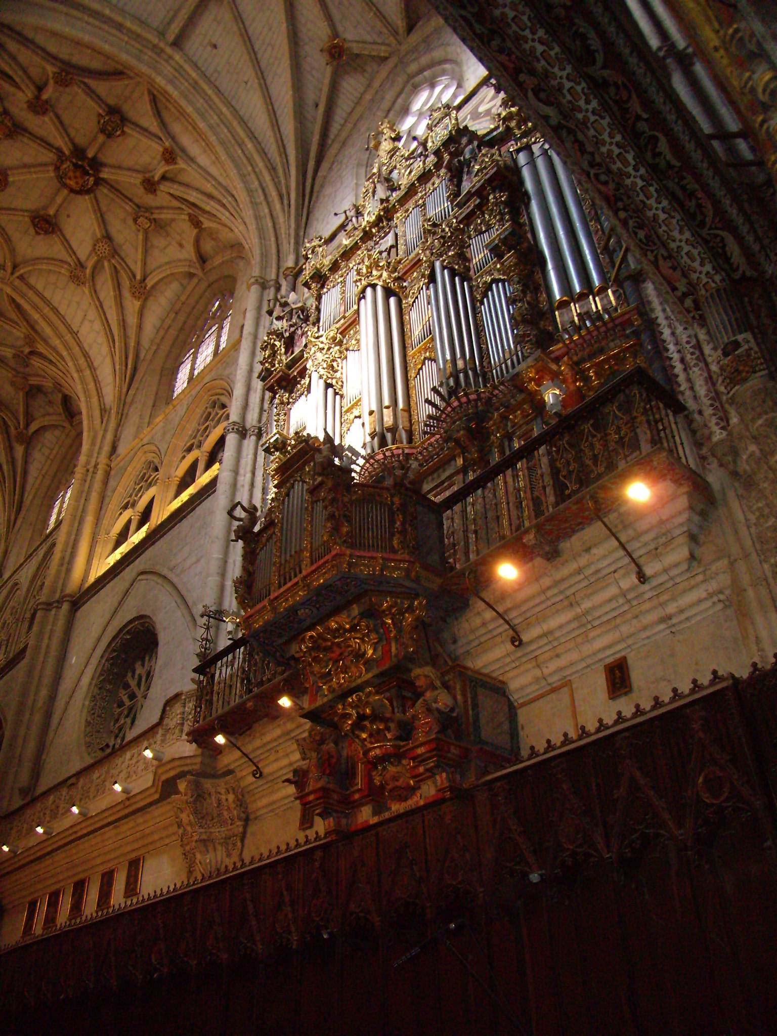 Órgano de la Catedral de Palencia, situado encima del Coro.